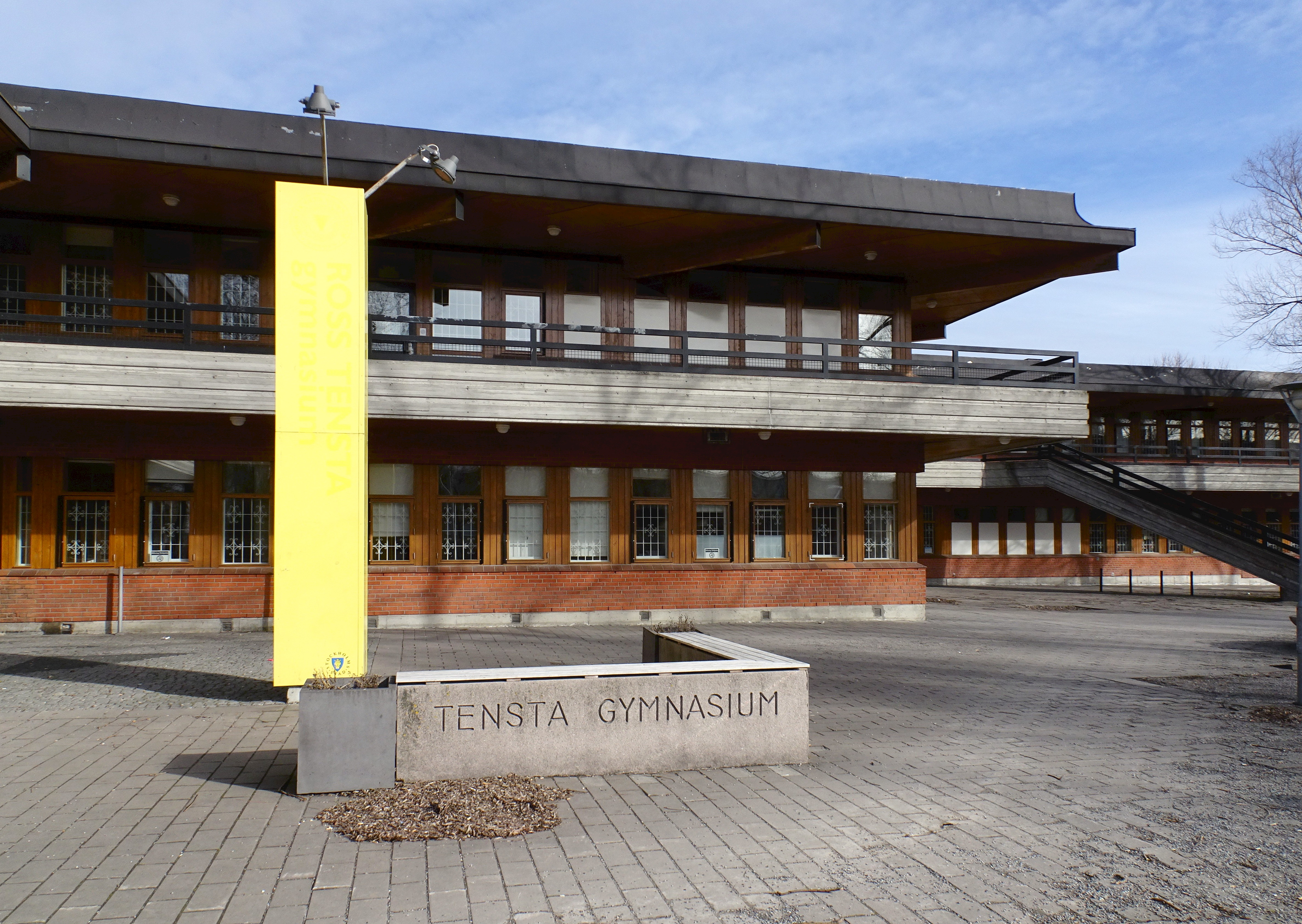 Tensta Gymnasium arkitekt Gösta Uddén